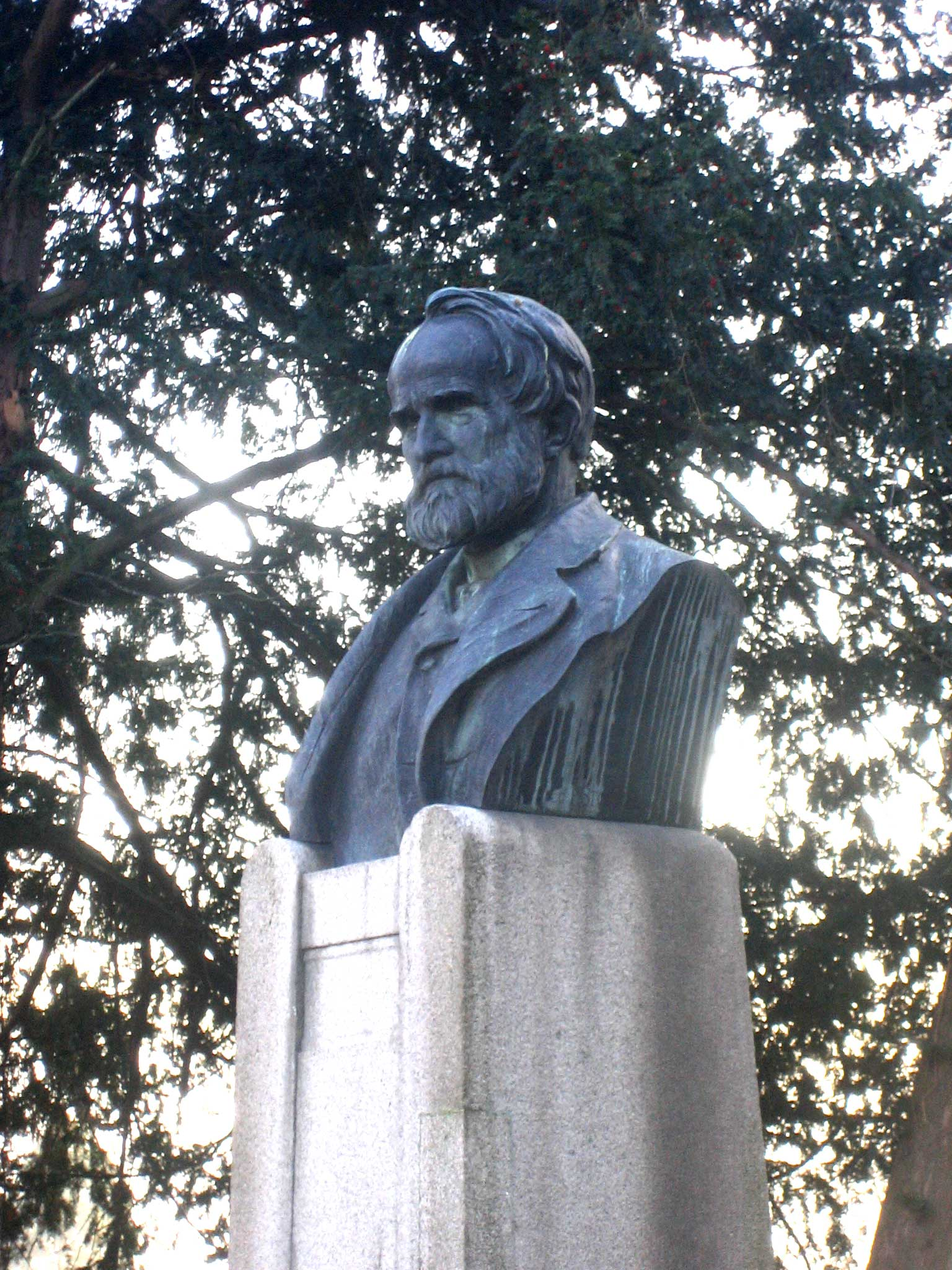 Denkmal für Johann Georg Fischer von Emil Kiemlen, 1900 (Guss: Paul Stotz)